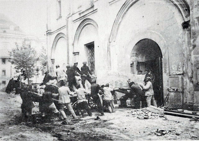 Перенесение останков великих княгинь и цариц перед разрушением Вознесенского монастыря